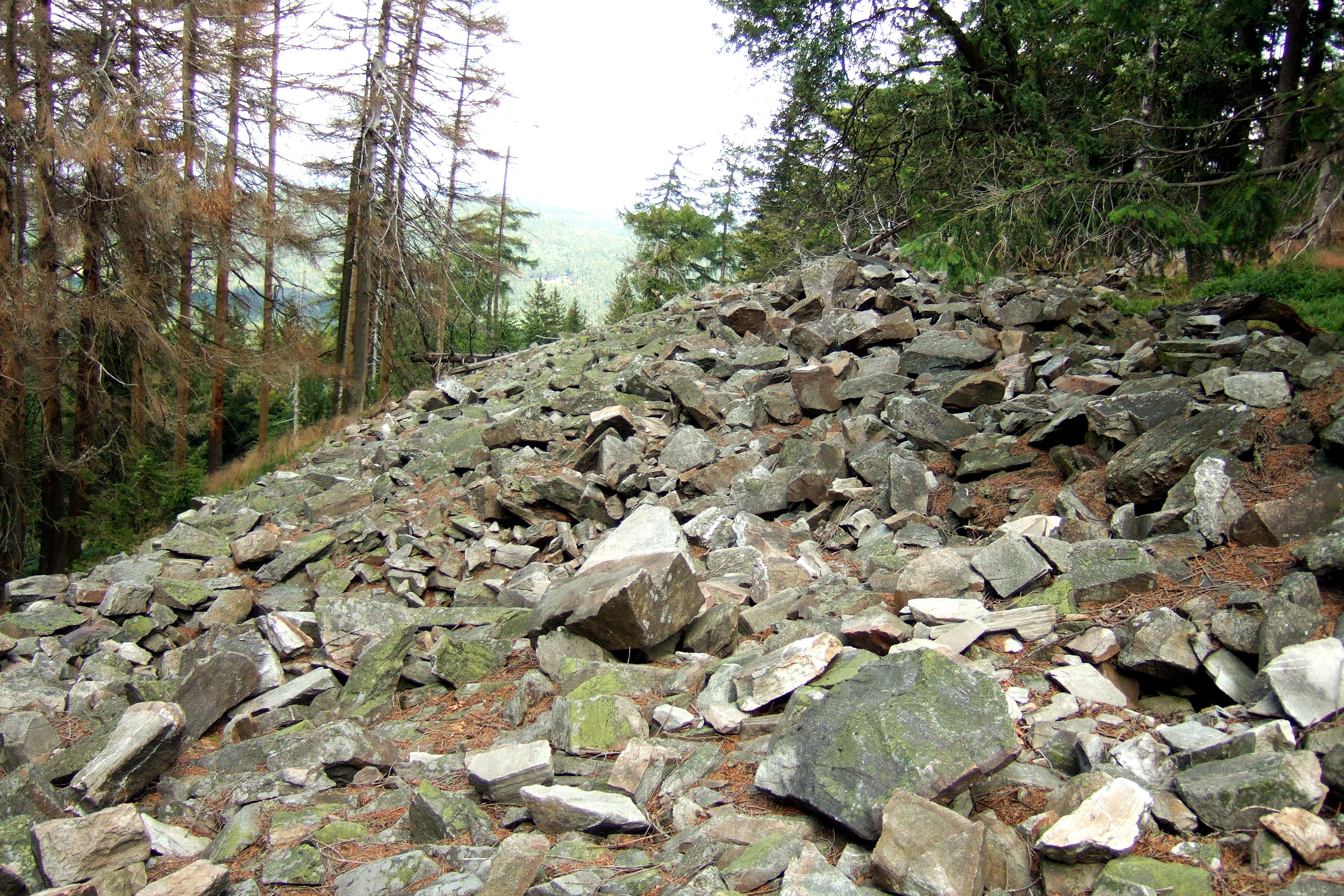 Innerer keltischer Ringwall auf dem Altkönig